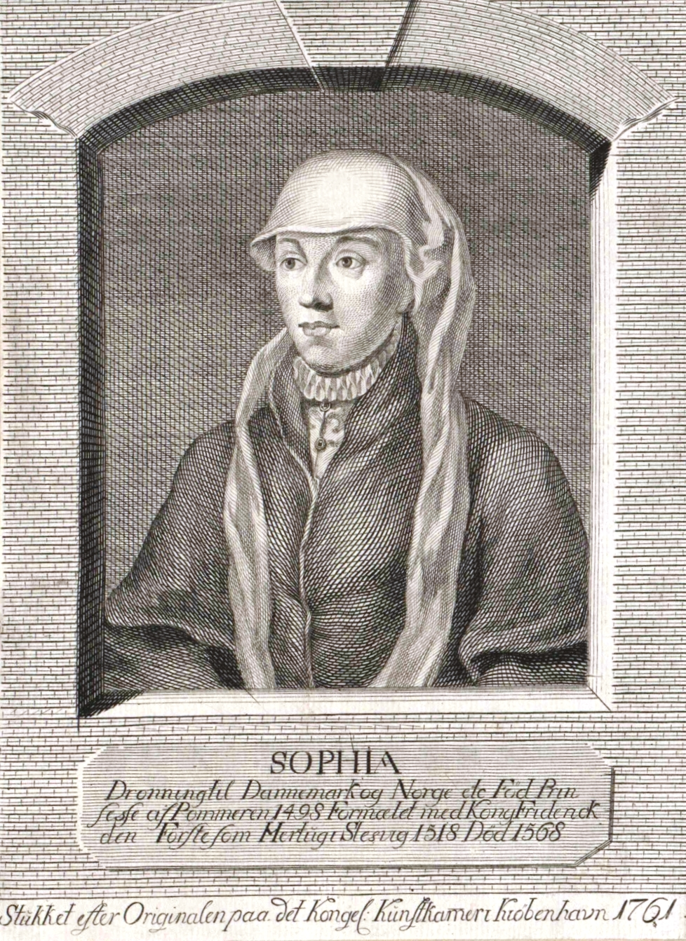 Sophia, Prinzessin von Pommern (1498–1568), nach dem Original in der Königlichen Kunstkammer (Kongens Kunstkammer) Kopenhagen